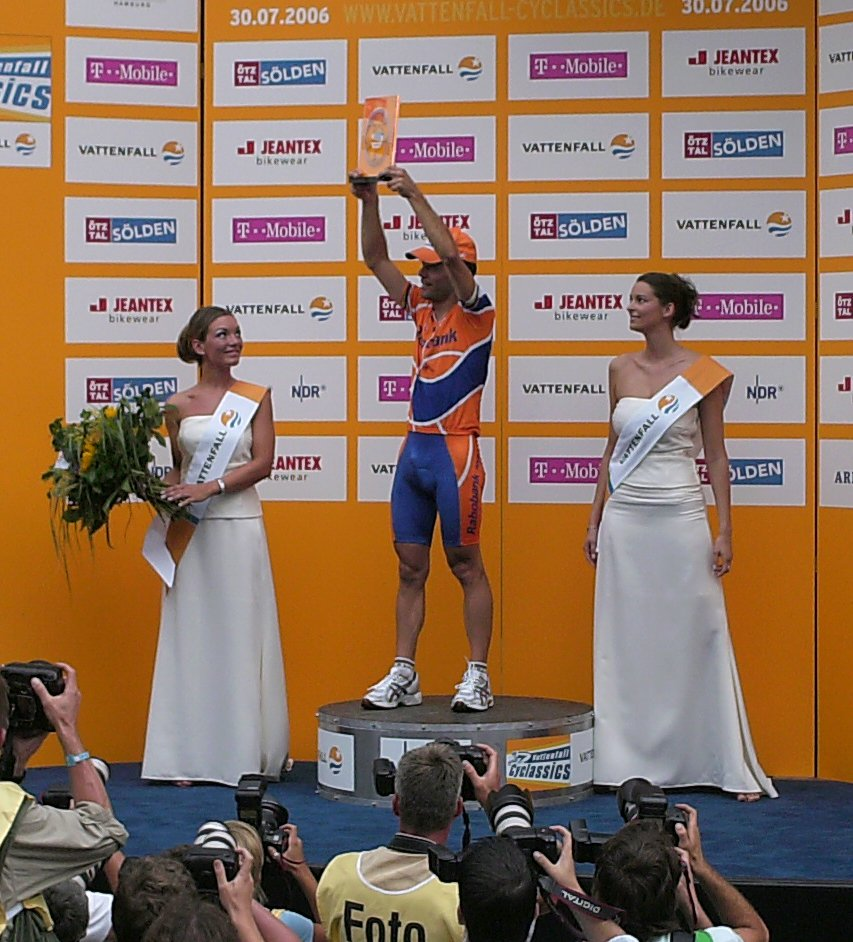 Óscar Freire, Gewinner der Vattenfall Cyclassics 2006 bei seiner Siegerehrung nach dem Rennen